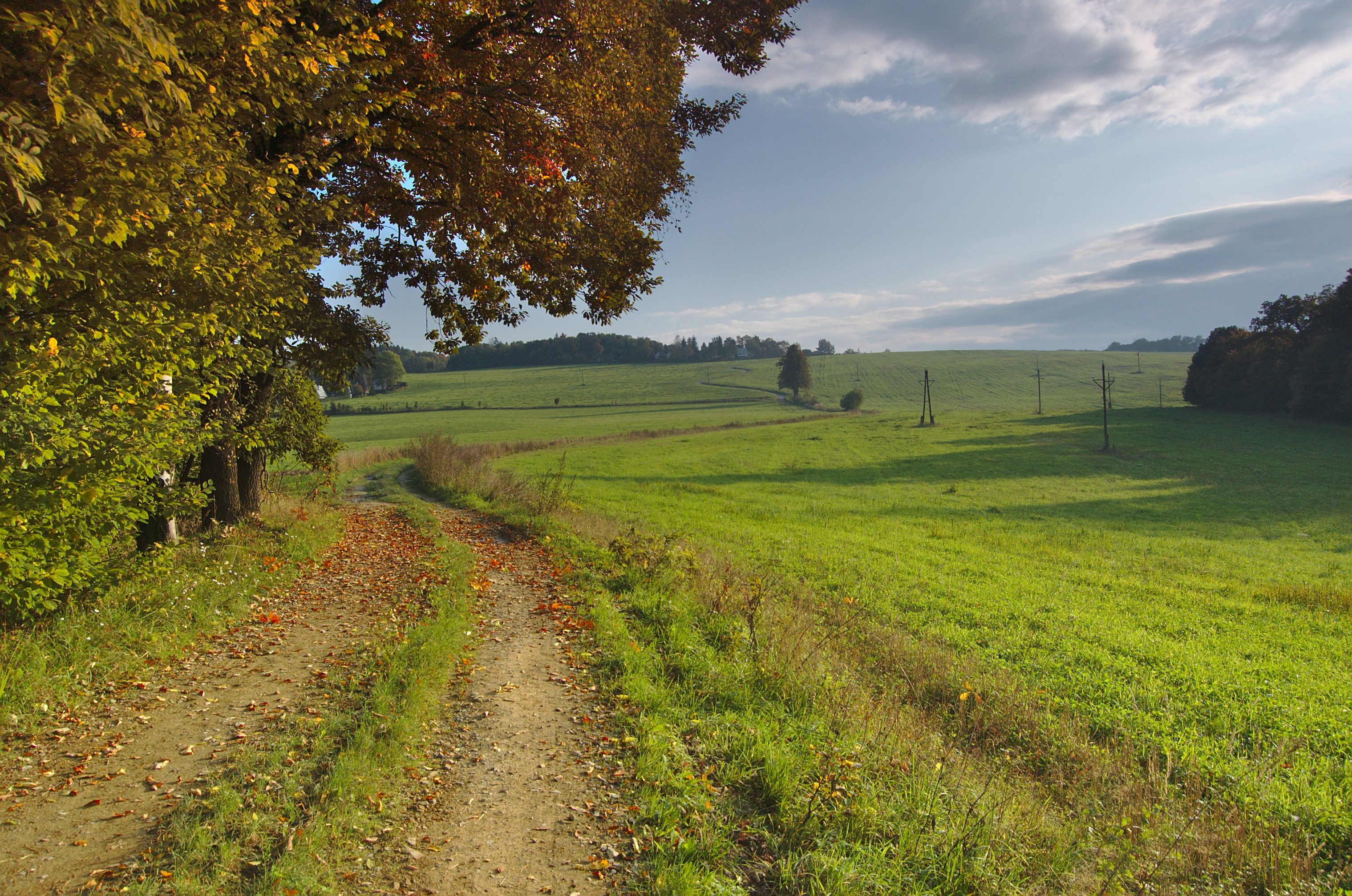 Přírodní park Bohdalov-Hartinkov, okres Svitavy